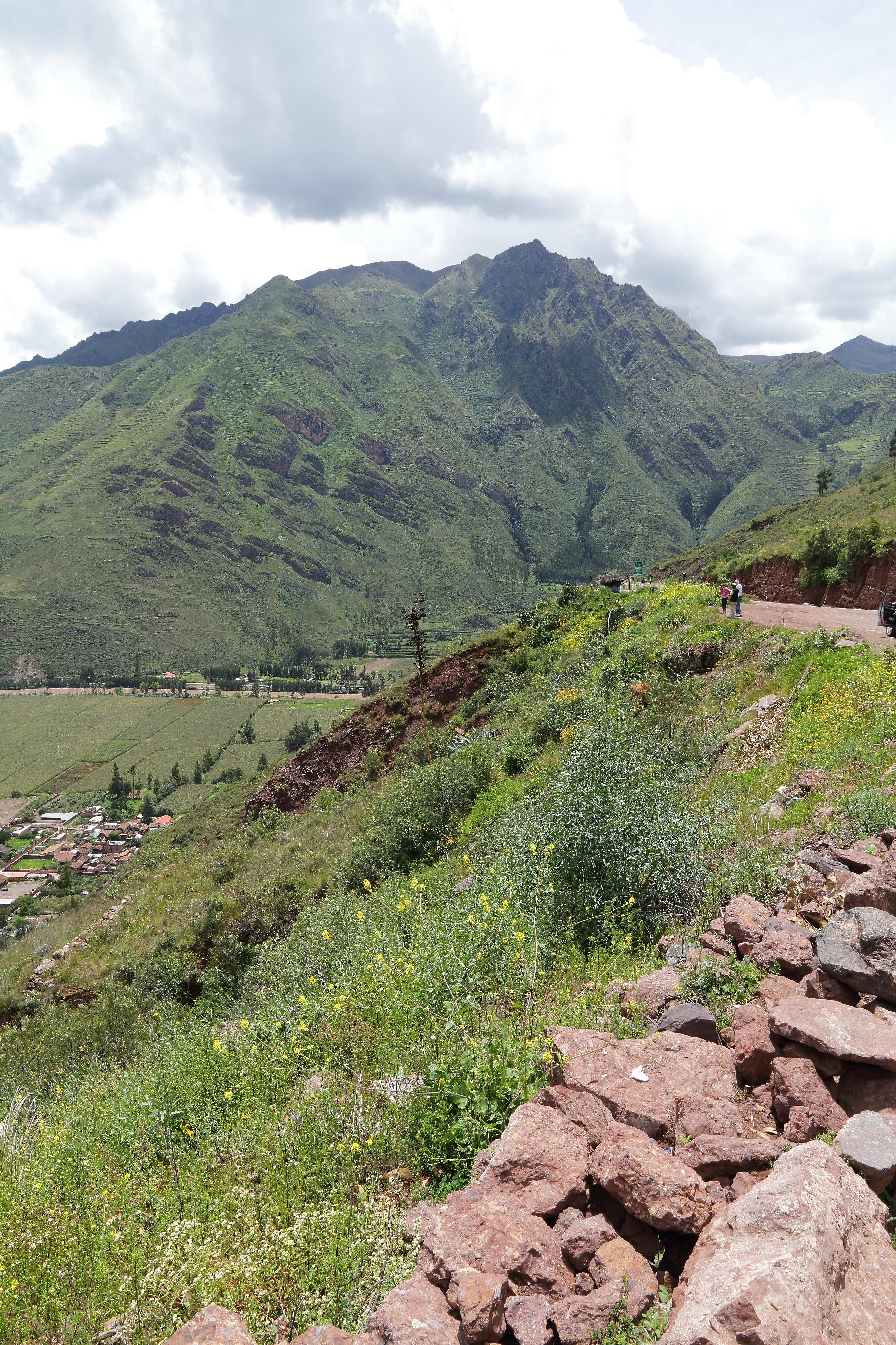 Urubambadalen, Cusco, Peru.